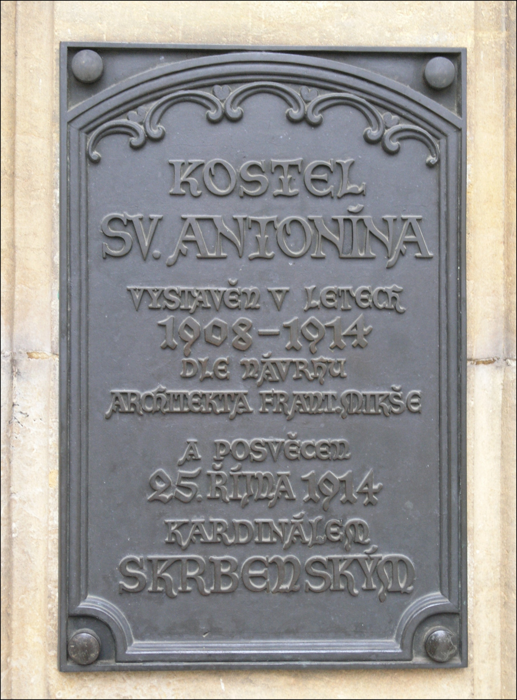 Česky: Kostel svatého Antonína z Padovy (Praha, Holešovice)